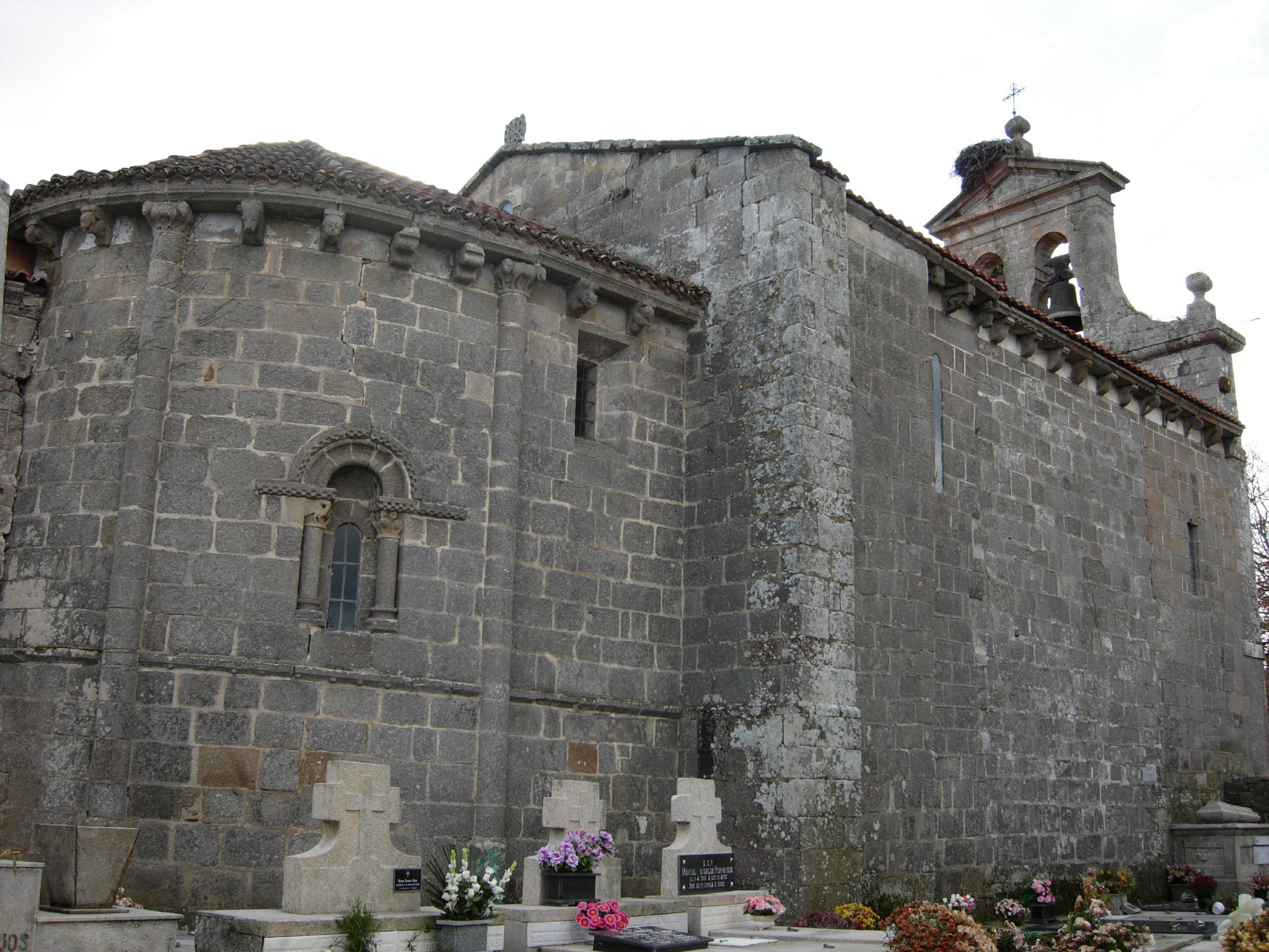 Iglesia de San Salvador de Asma. Planta rectangular de nave única y cabecera semicircular. La nave ha sufrido diversas alteraciones, a pesar de las cuales todavía conserva parte de los muros laterales y en ellos las ventanas románicas bajo arco de medio punto con el consabido derrame hacia el interior.